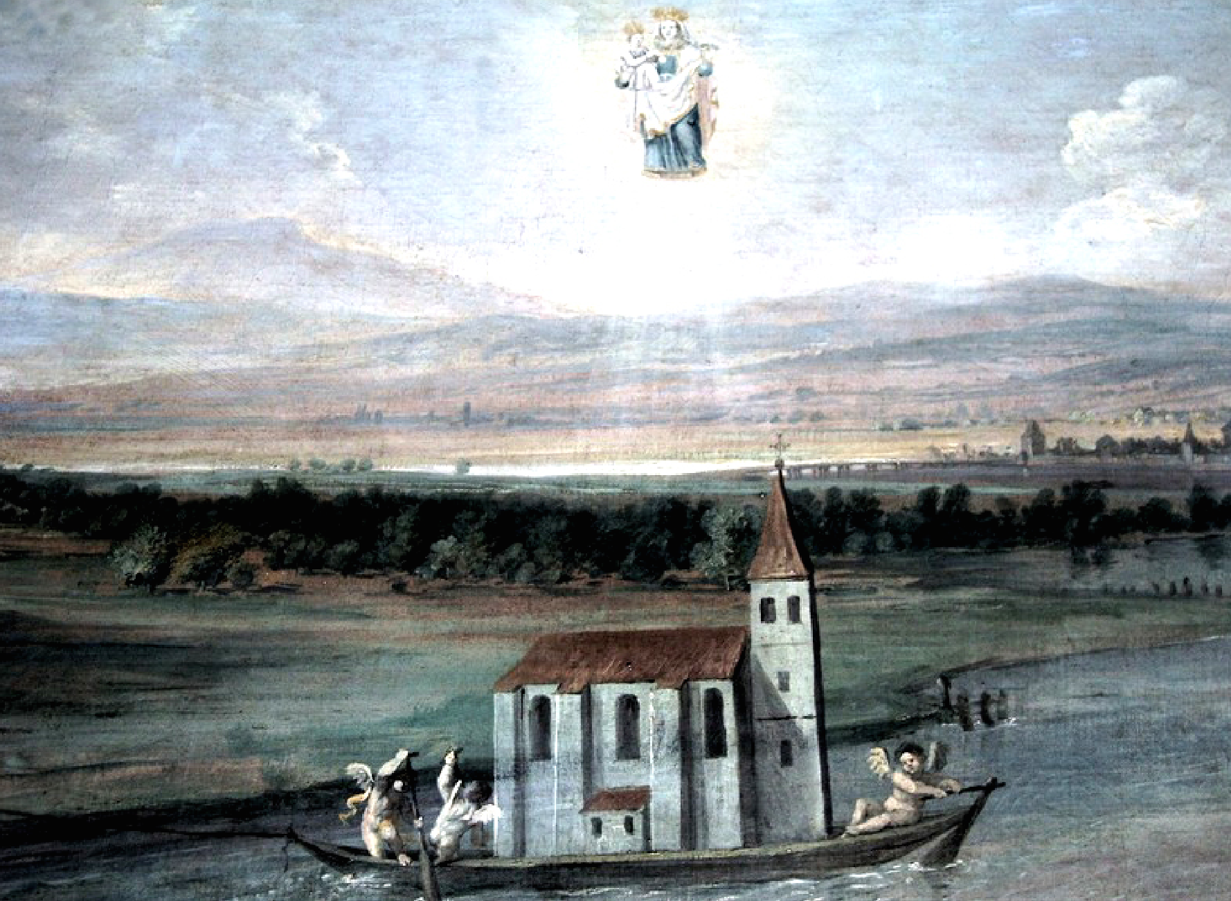 Ölgemalde in der Oberkirche des Münchner Bürgersaals in der Fußgängerzone vorne an der linken Seitenwand Titel "Sossau"